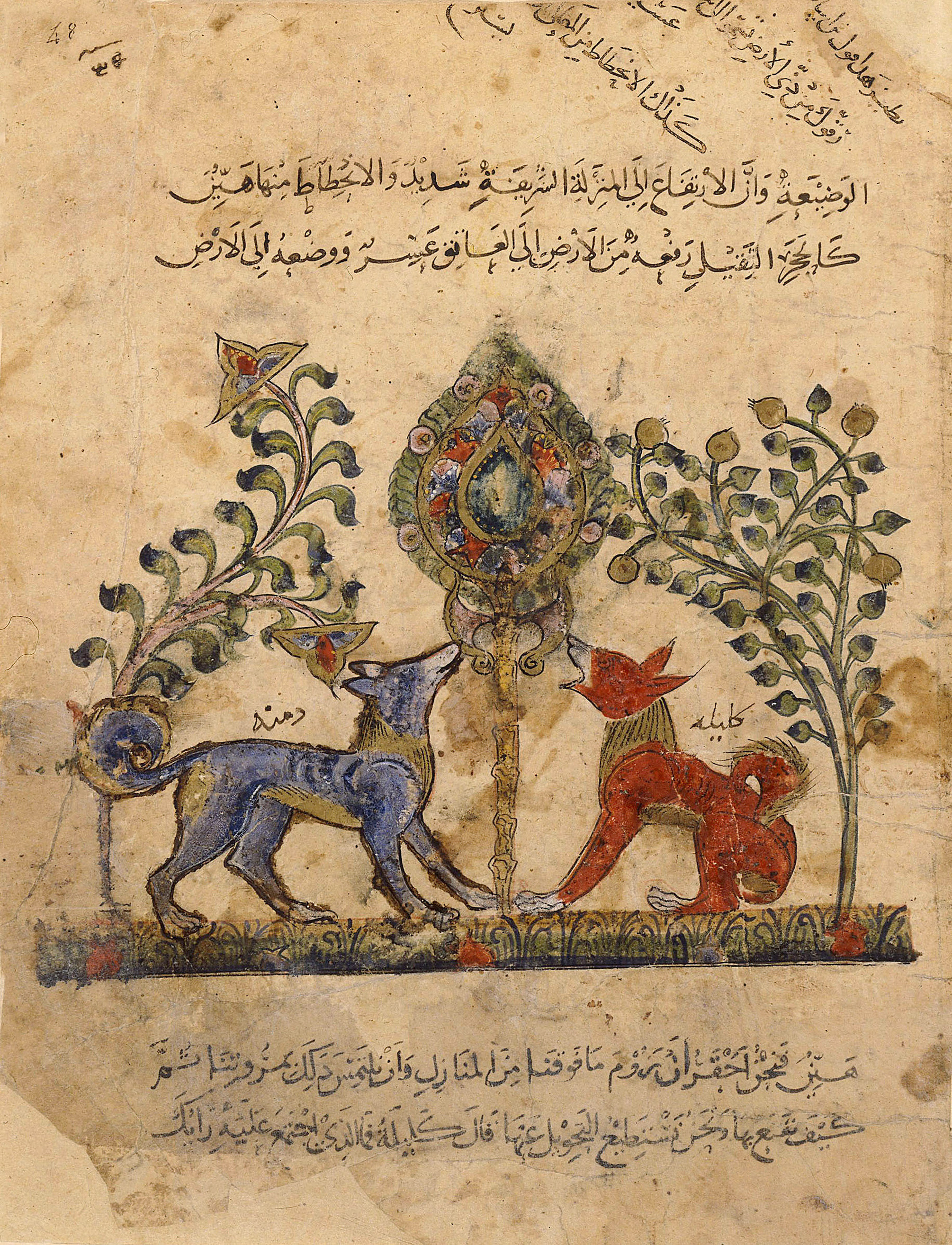 Image tirée d'un manuscrit de Kalîla wa Dimna daté de 1220